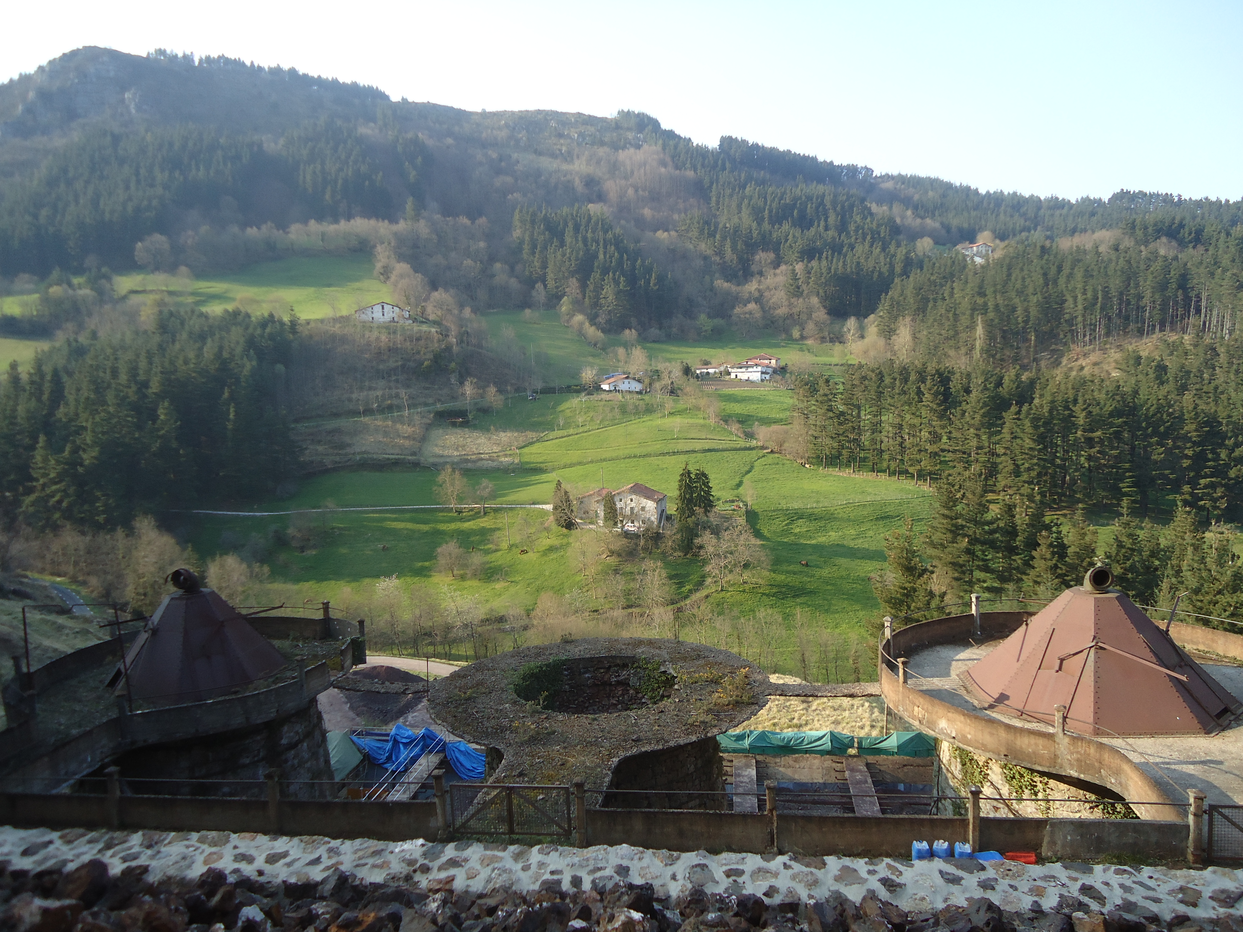 Zeraingo paisaia Aizpea meategitik